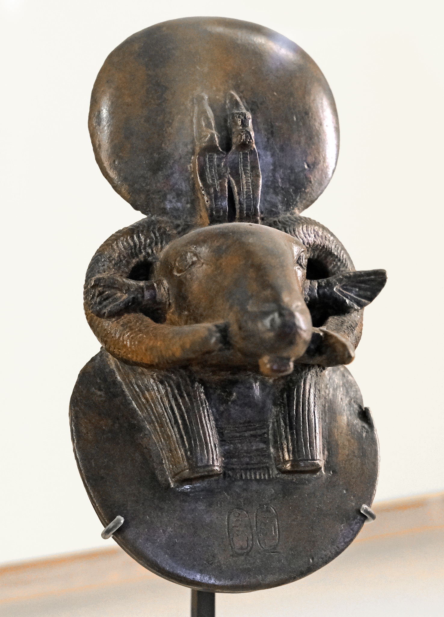 Un système de clips à l'arrière permettait de l'accrocher à la barque processionnelle d'Amon.